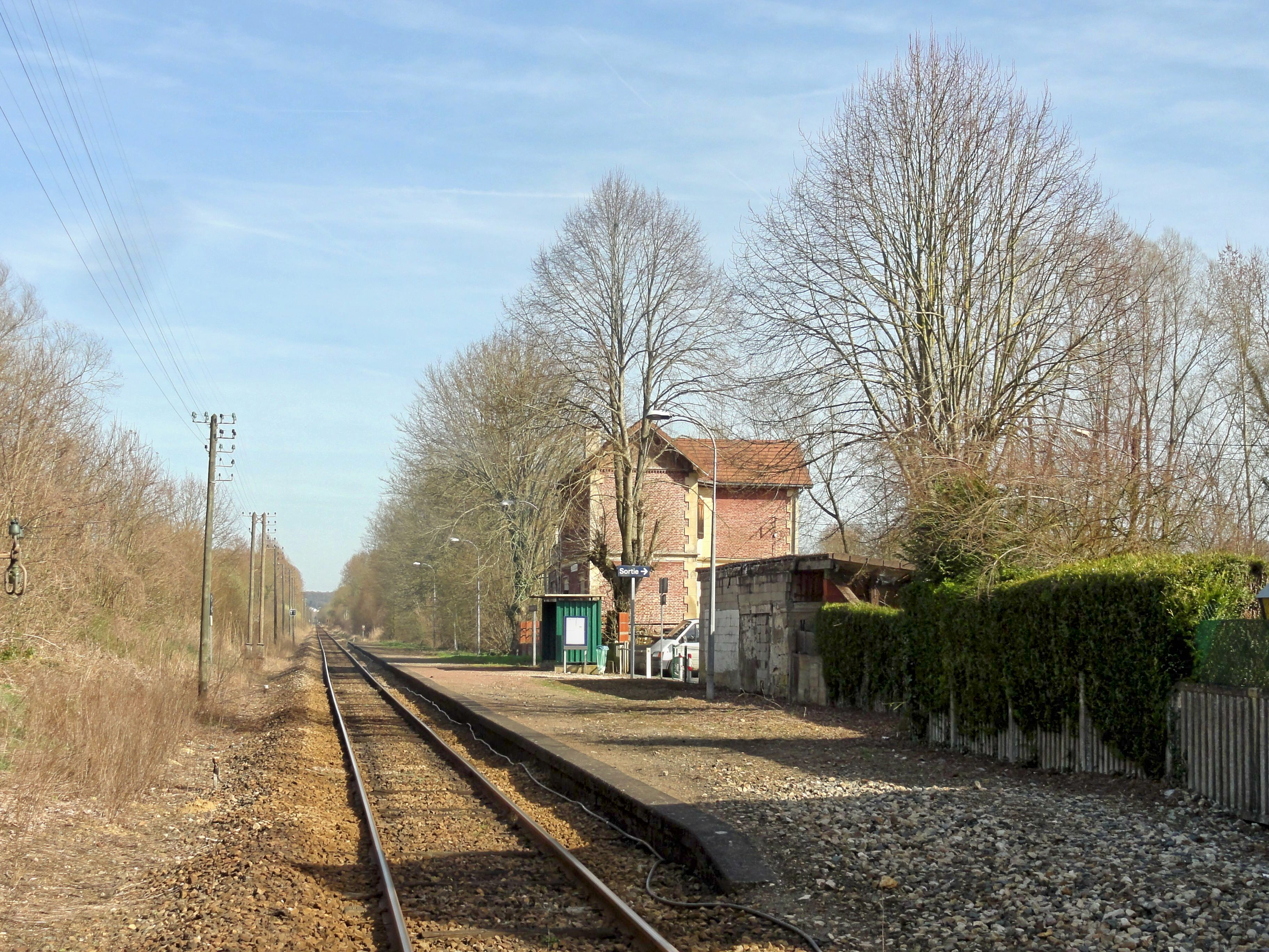 Gare d'Heilles - Mouchy ; vue depuis le passage à niveau. La direction de Creil est au fond ; celle de Beauvais derrière le photographe.